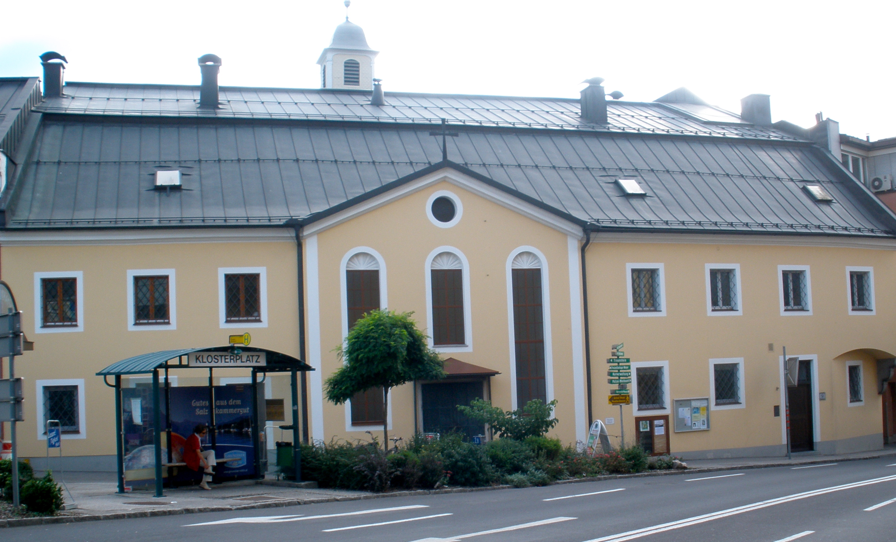 Das Gmundner Karmelitinnenkloster samt -kirche wurde 1828 vom damaligen Prager Mutterkloster aus gegründet.